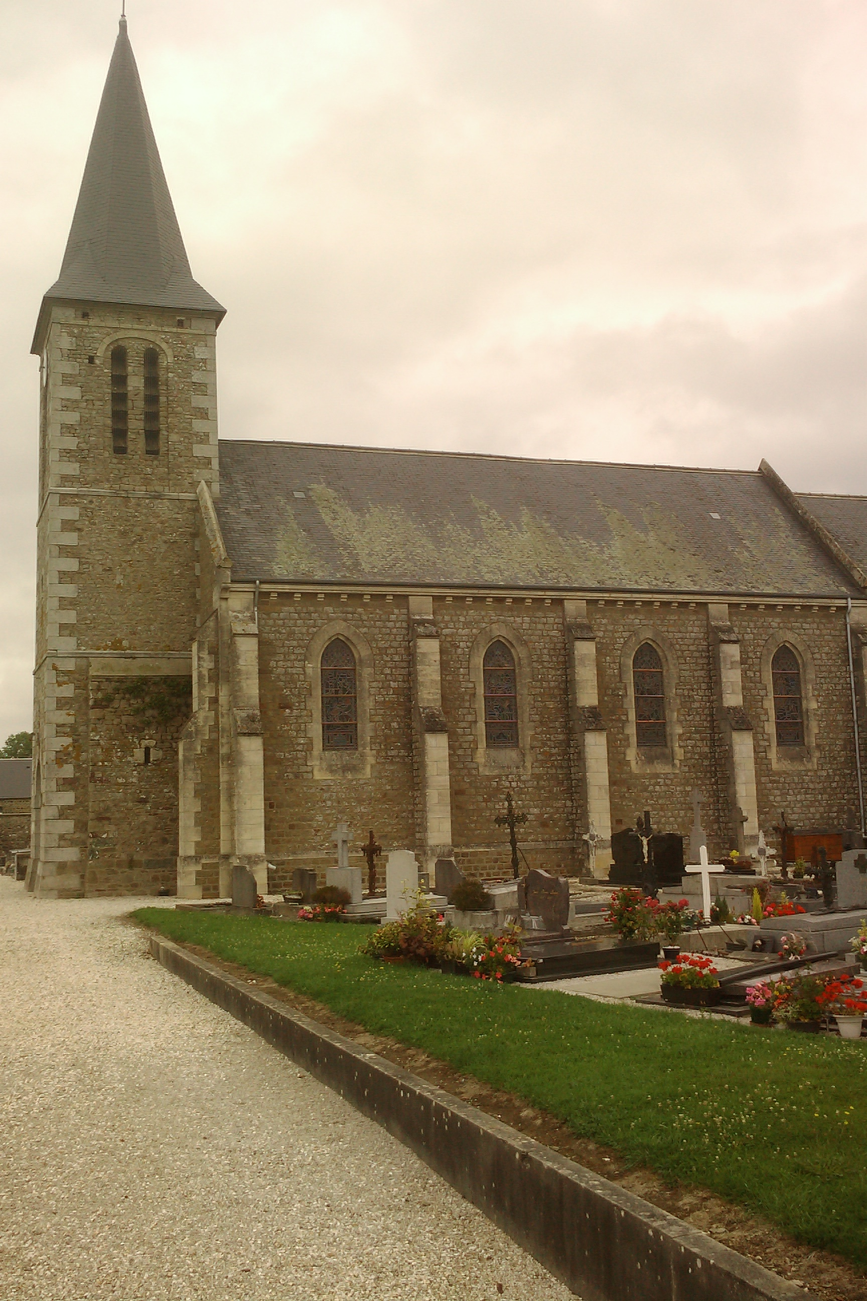 vue de la commune Giéville